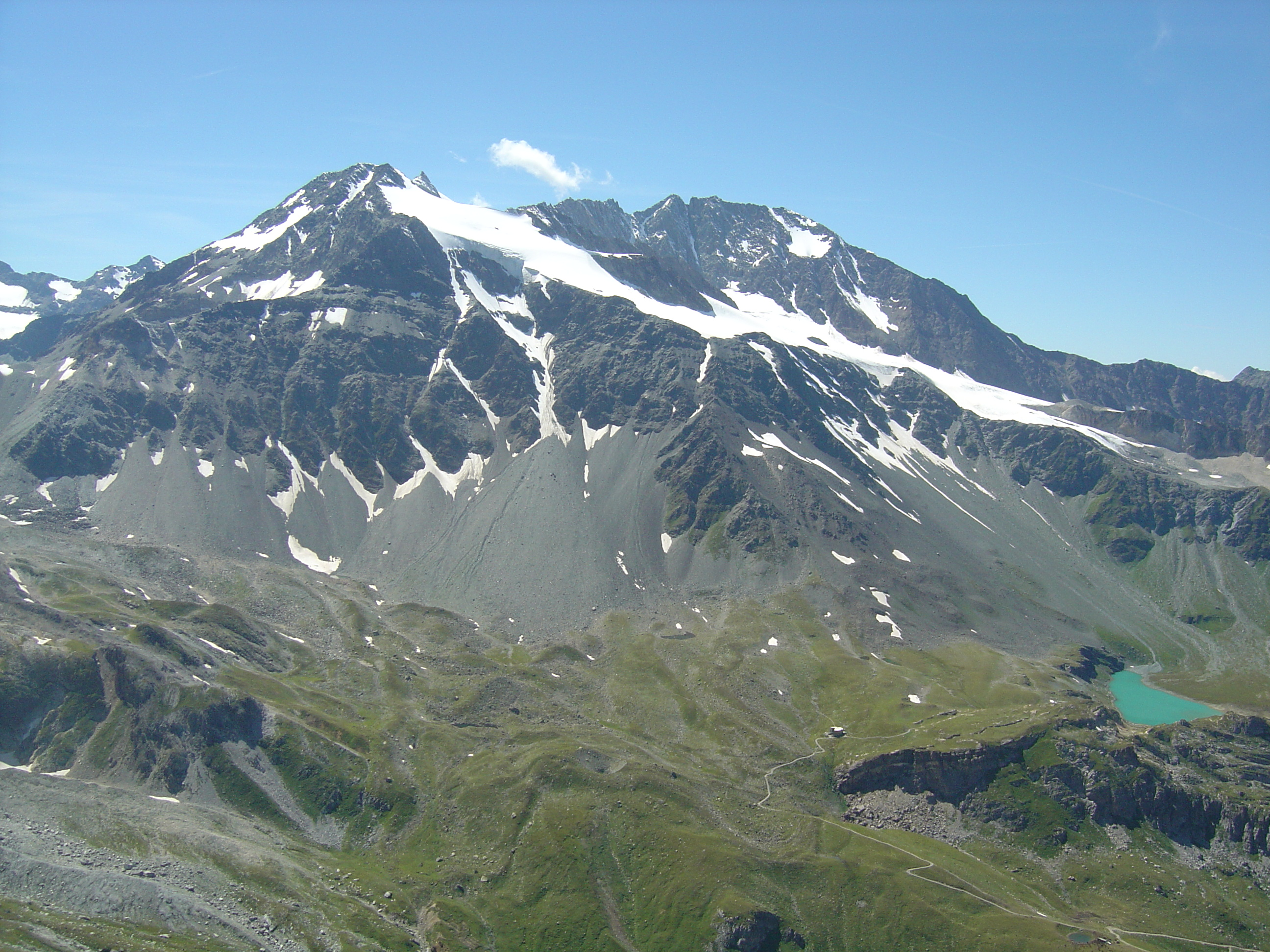 L'Aiguille de Polset (3531m), le glacier de Gébroulaz puis le refuge de Péclet et le lac Blanc plus bas vus depuis la Pointe de l'Observatoire (3015m)